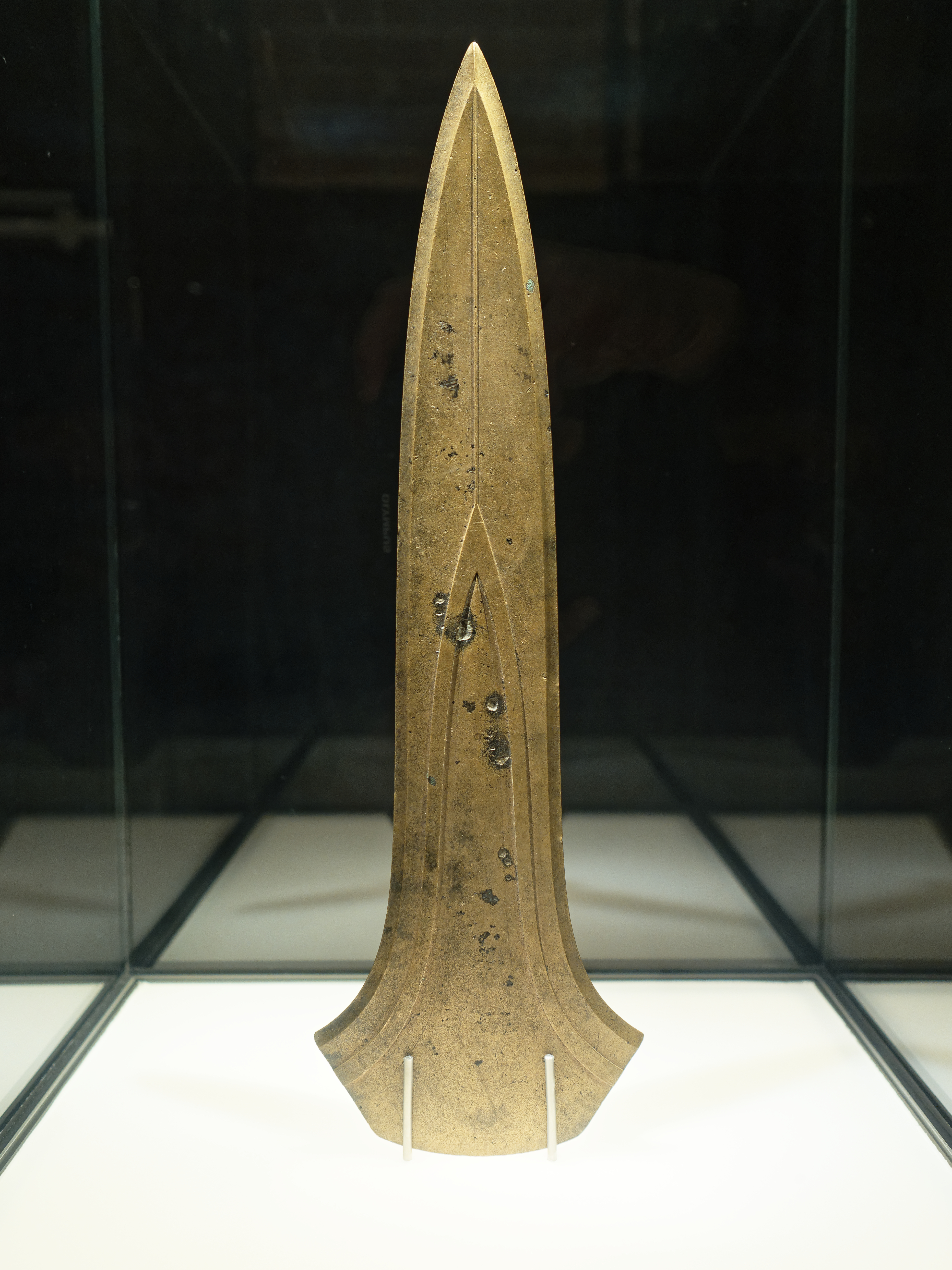 Zwaard van Jutphaas. Zwaard uit de Bronstijd (Plougrescant-Ommerschans) Rijksmuseum van Oudheden